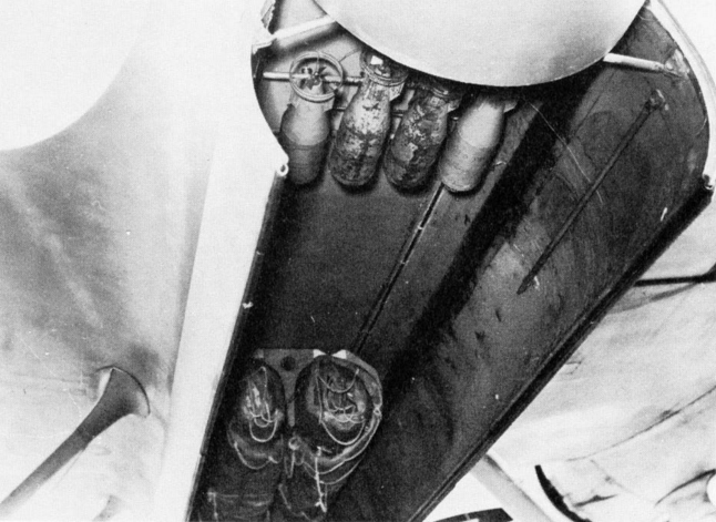 Cant Z.506B vano bombe